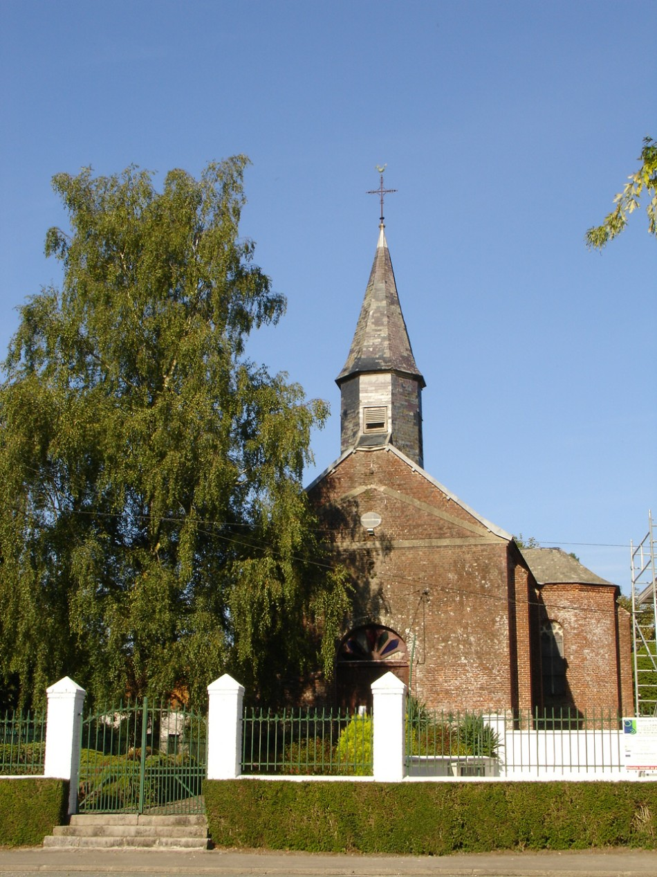 Église de Quilen